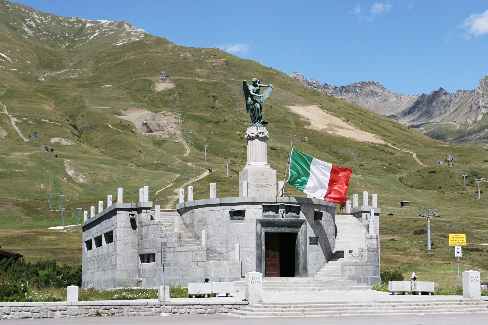 WW I memorial (Monumento Ossario) on Passo Tonale - Kriegsdenkmal (Monumento Ossario) am Tonalepass